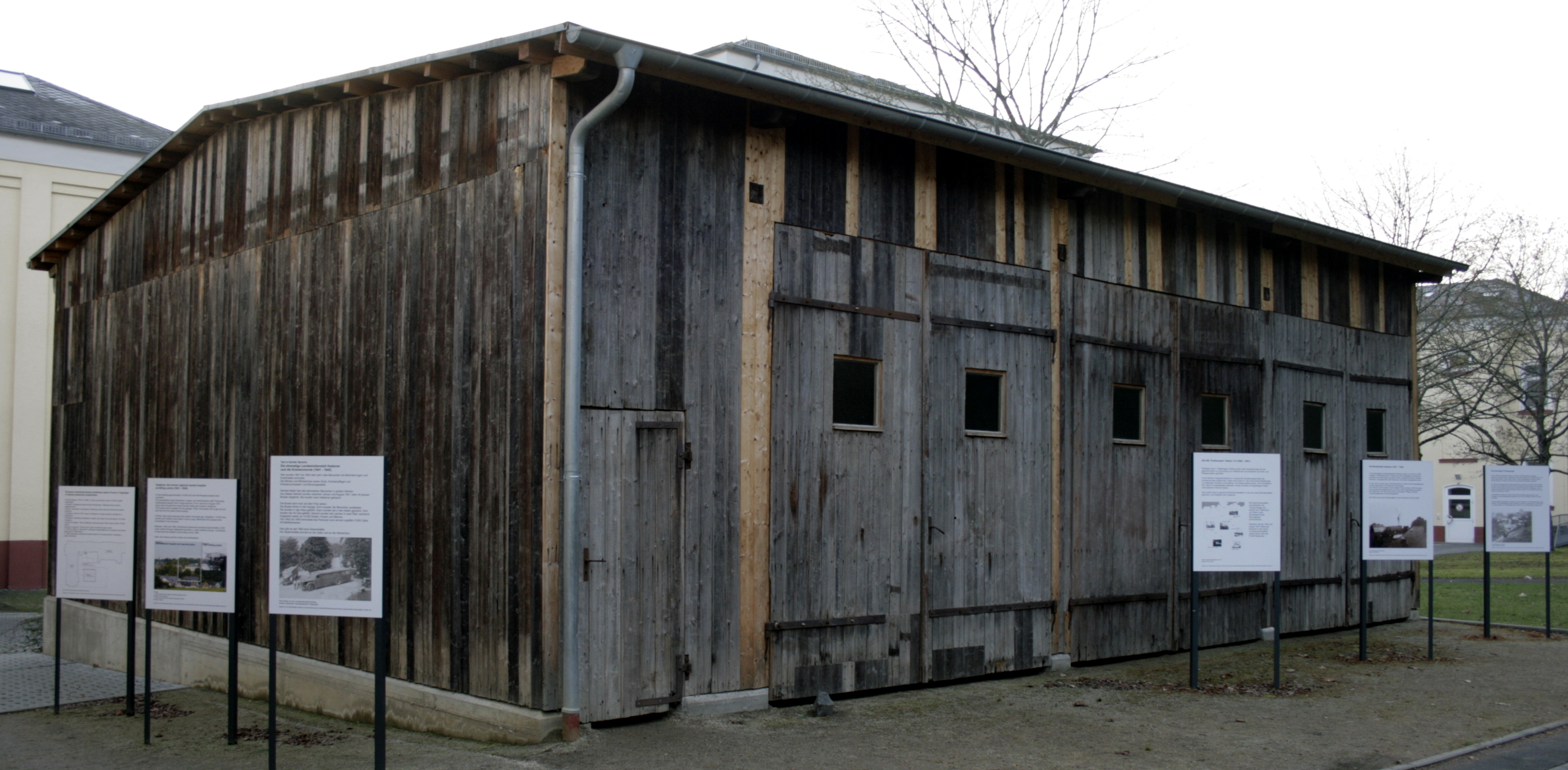 Gedenkstätte Hadamar, Busschuppen